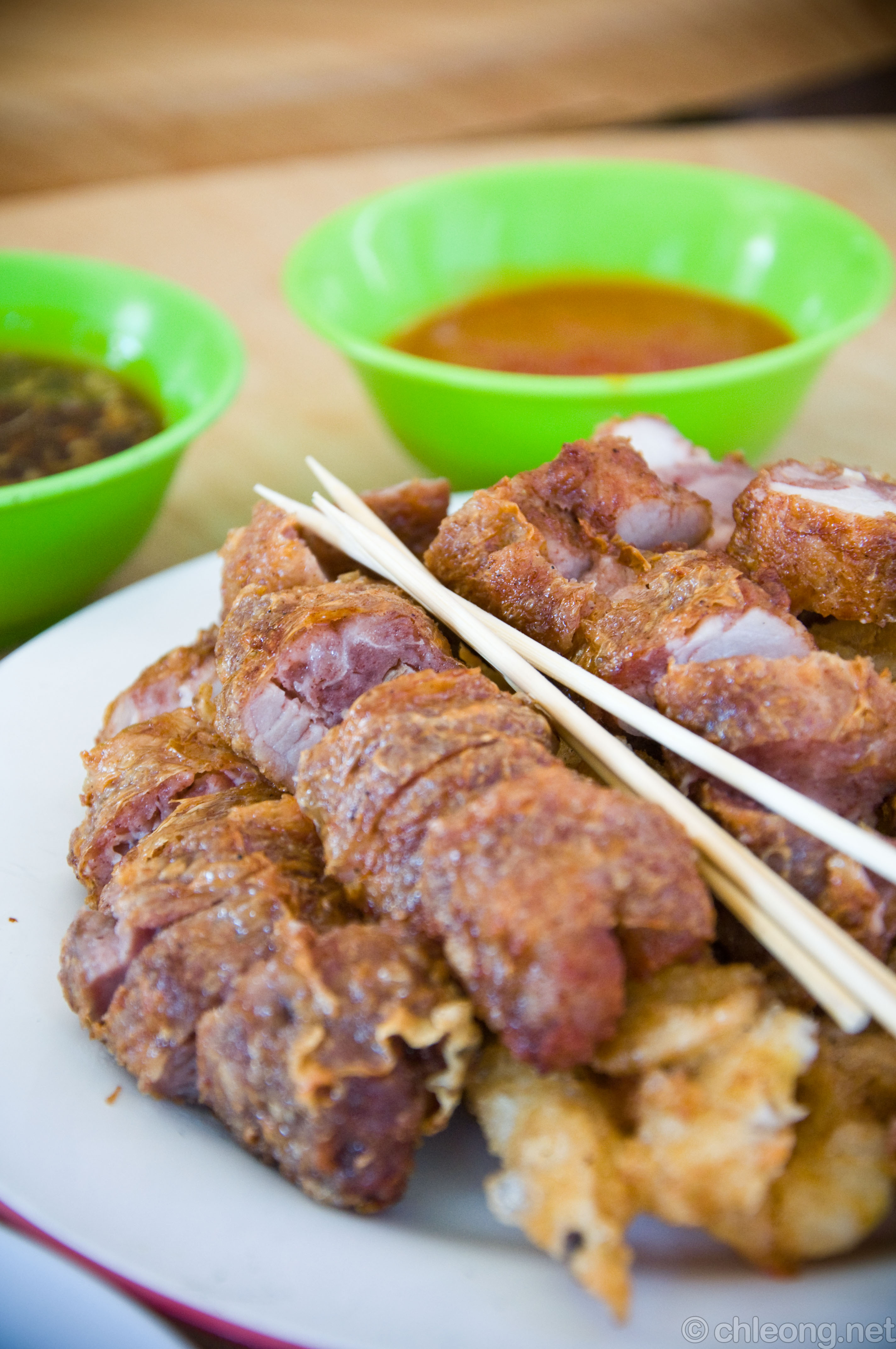 Penang Loh Bak